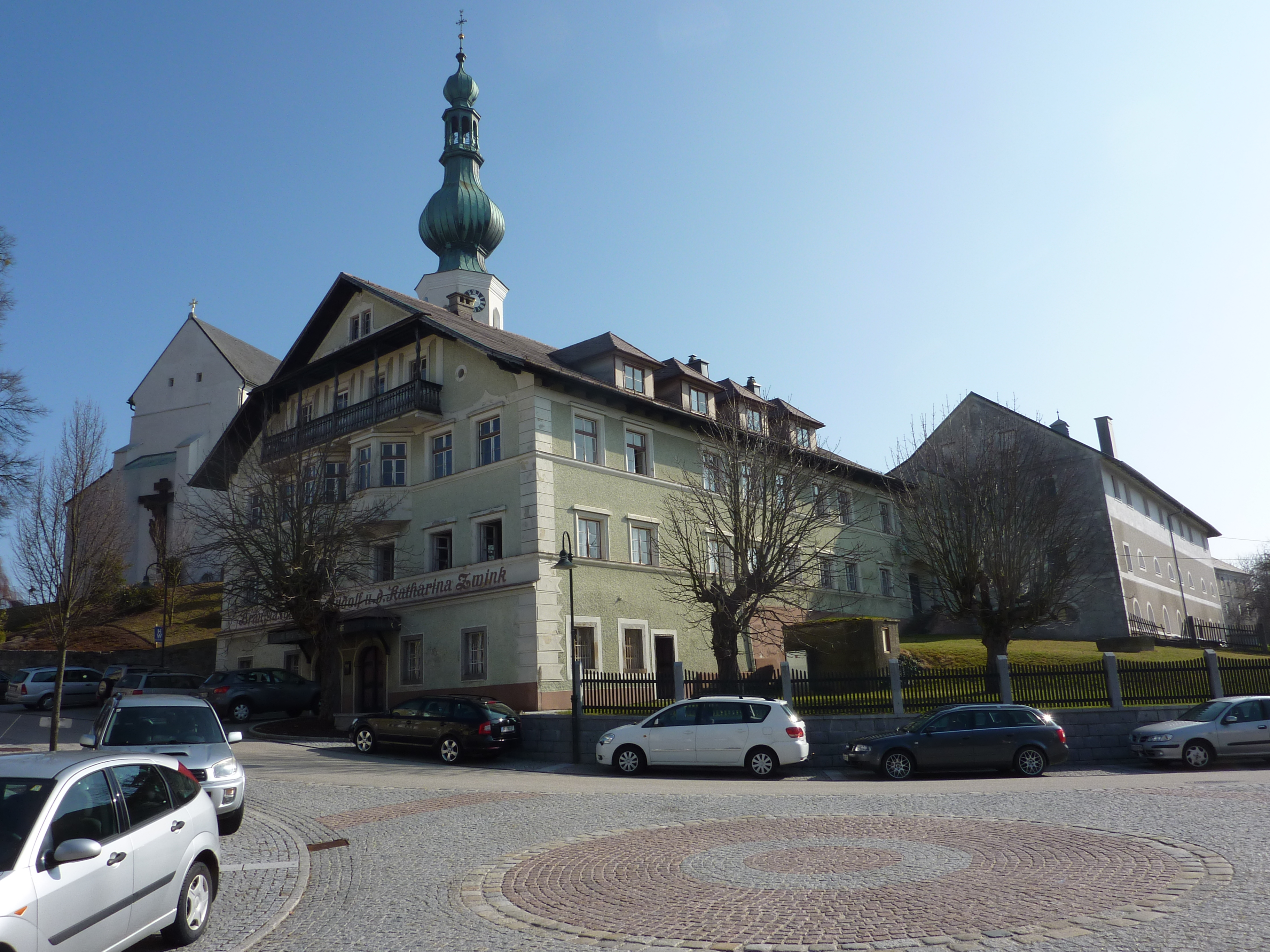 Bräugasthof Zwink-Bleckenwegner, Aspach, Marktplatz 2, Oberösterreich